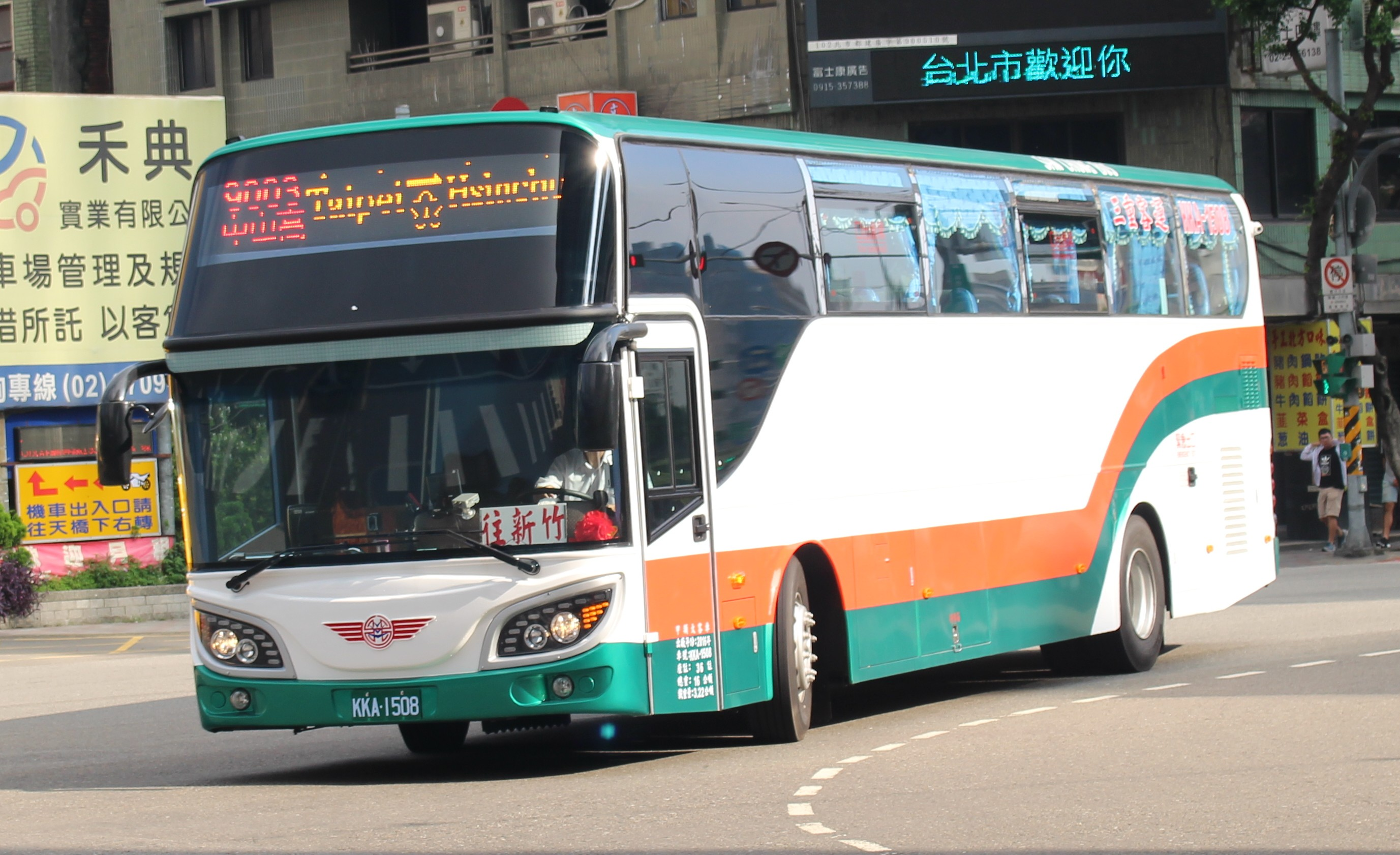 三重客運KKA-1508 9003